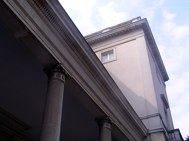 Детаљ са фасаде предње стране Новог "Белог" Двора на Дедињу, Београд / СЦГ